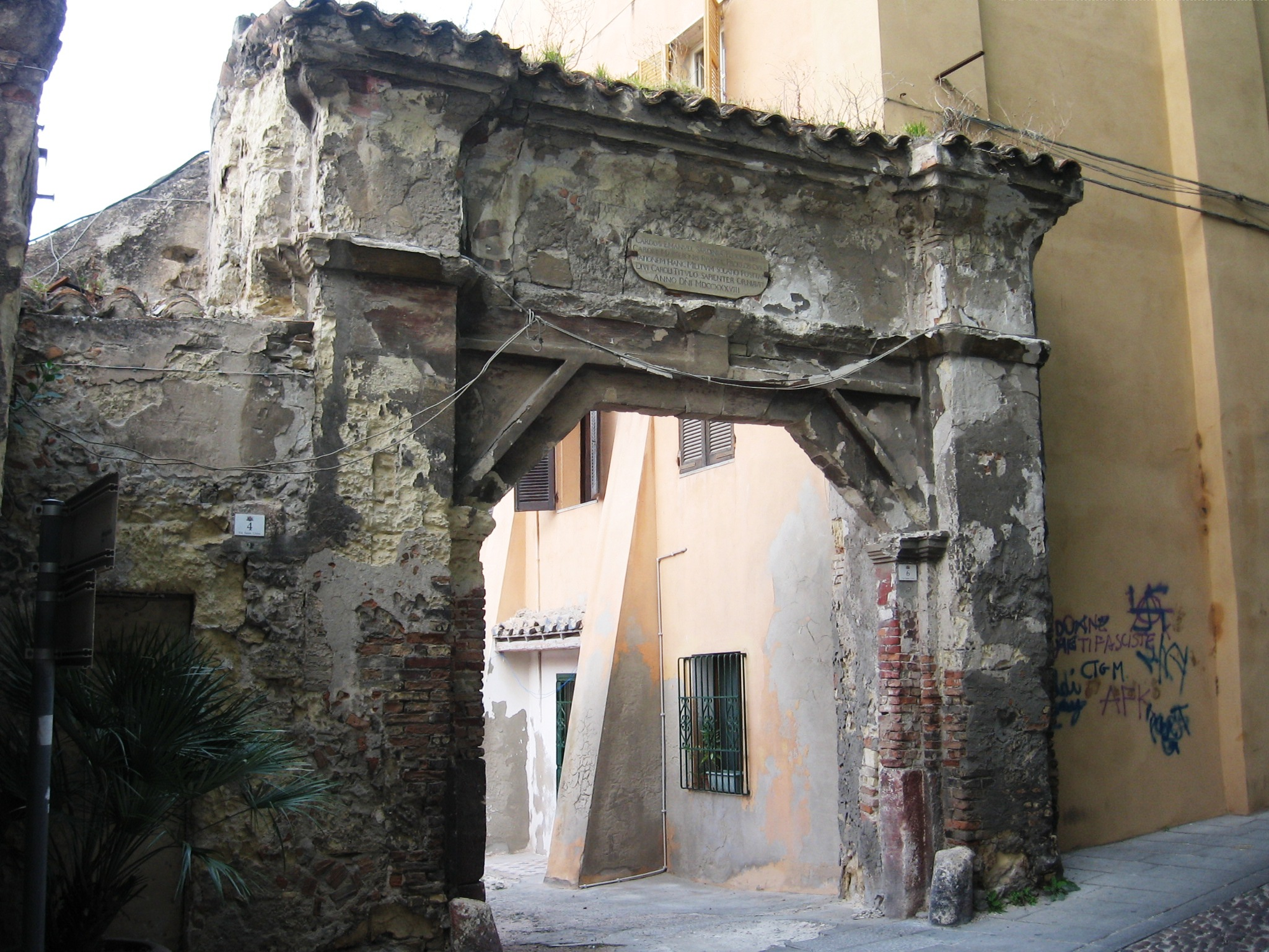 Il portone dell'attuale caserma San Carlo, nell'ex ghetto ebraico di Cagliari.